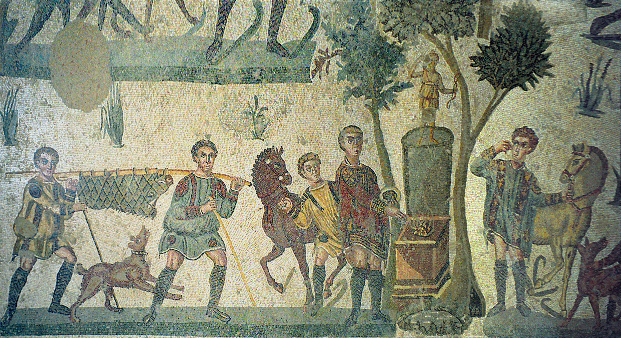 Sicily, Villa Romana del Casale